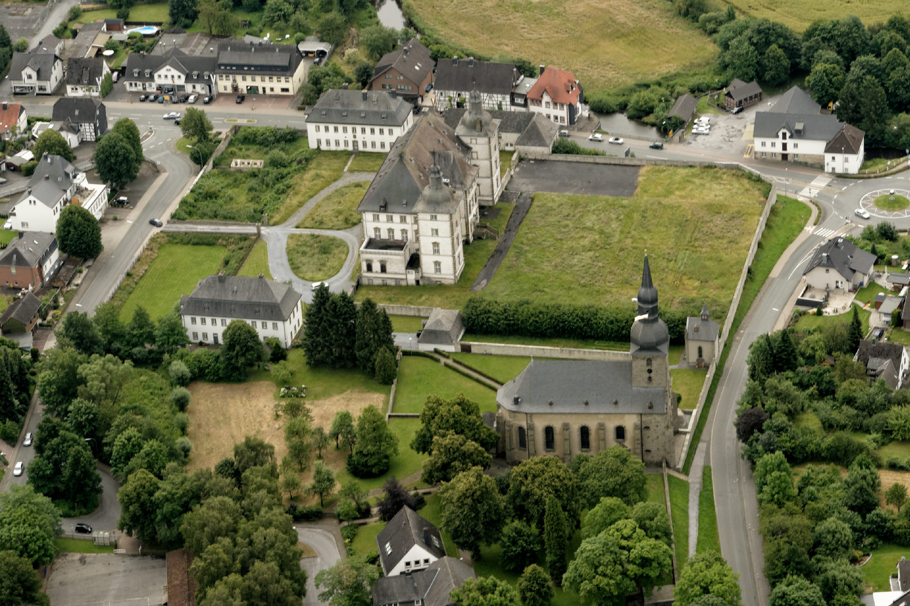 Deutschordenskommende Mülheim an der Möhne mit Komtureigebäude, Rentei, Pfarrei, der Kirche St. Margaretha, der Kapelle auf dem Schwesternfriedhof in Warstein-Sichtigvor (Fotoflug Sauerland Nord) The making of this document was supported by the Community-Budget of Wikimedia Germany.